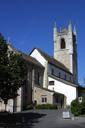 Kirche St. Martin in Vevey